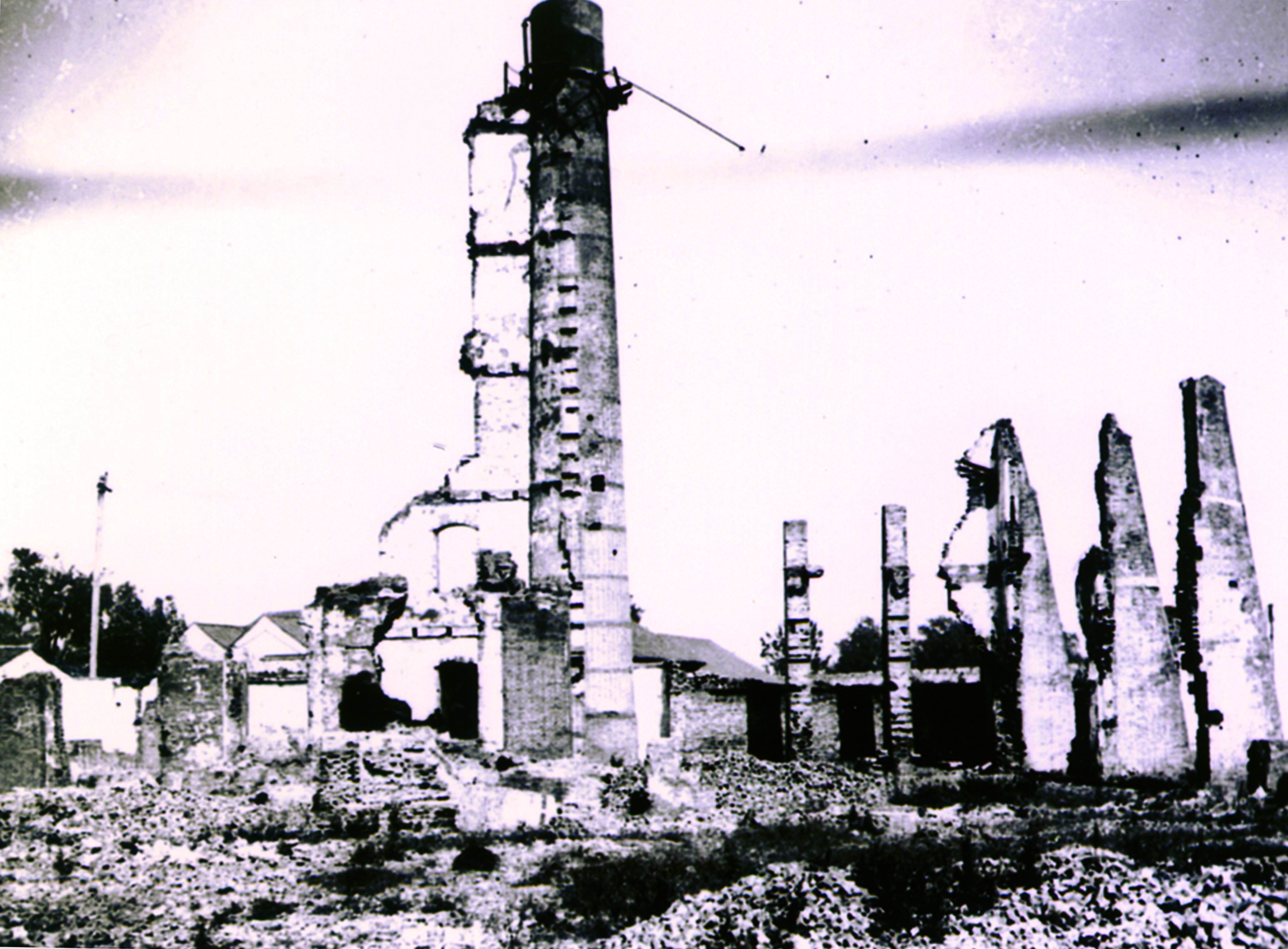 中文（香港）: 被炸燬的茂新面粉厂